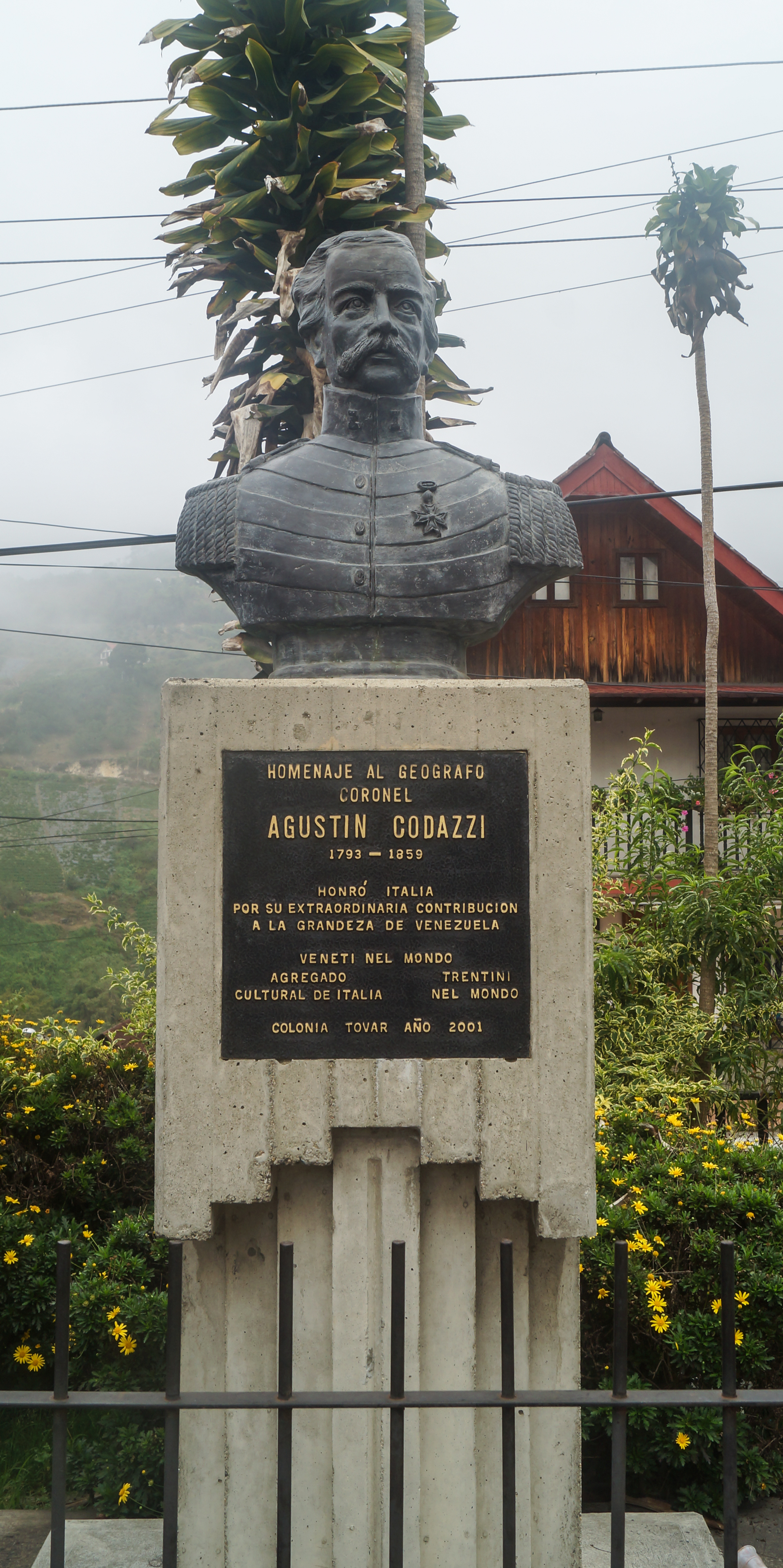 Busto de Agustín Codazzi en la localidad de la Colonia Tovar. Aragua. Venezuela